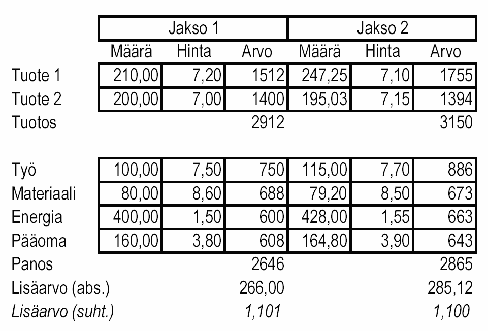 Liiketoiminnan kannattavuus